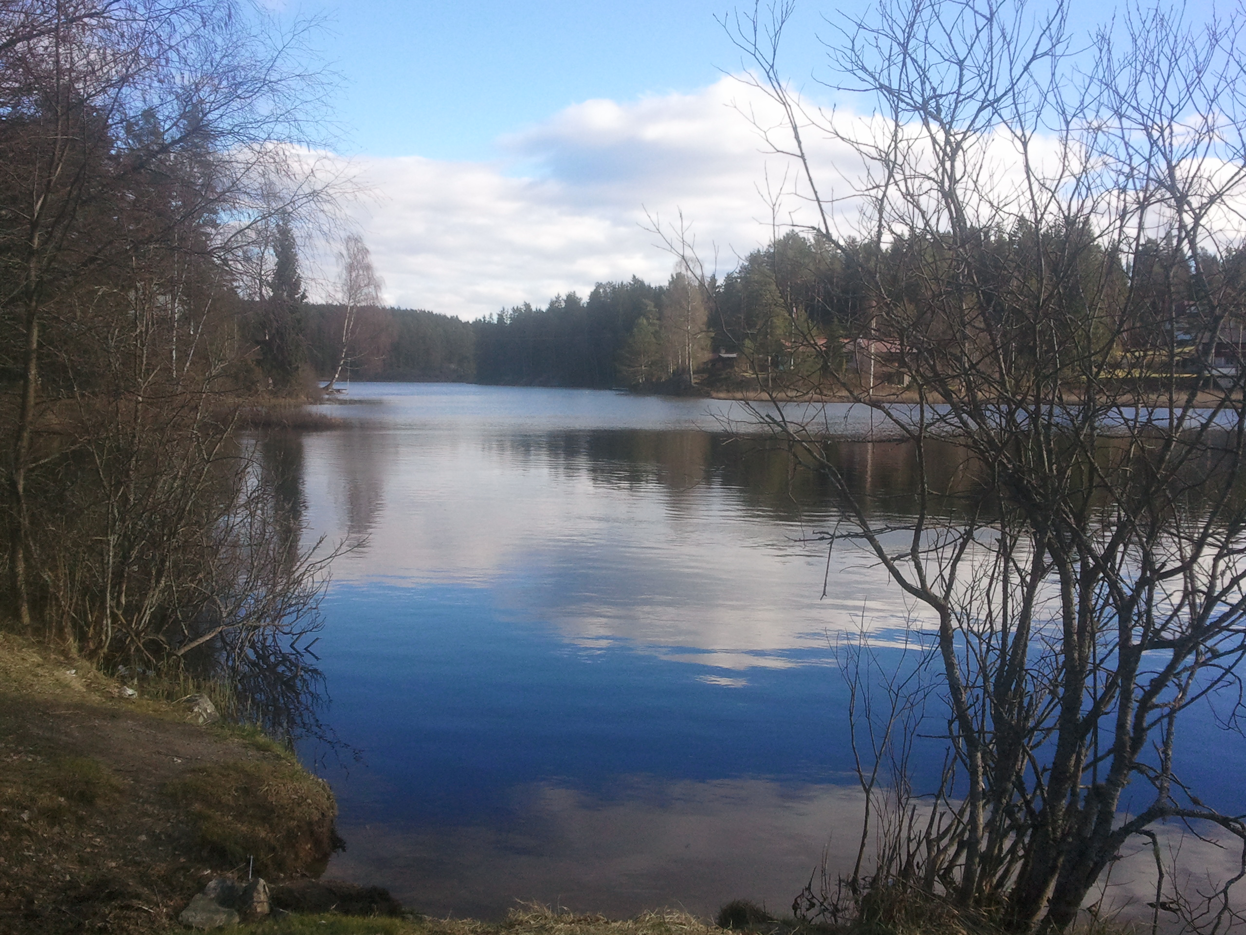 Sværsvann sett fra fylkesvei 155